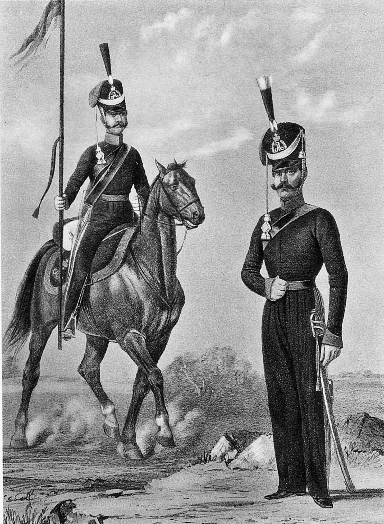 Казак и Унтер-офицер Конных полков Полтавского ополчения, 1812-1815.